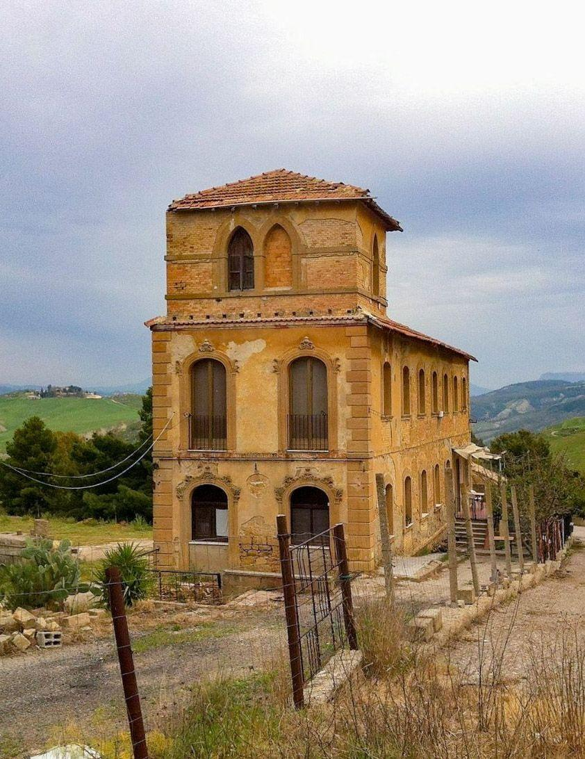 Rudere della miniera Testasecca a Caltanissetta